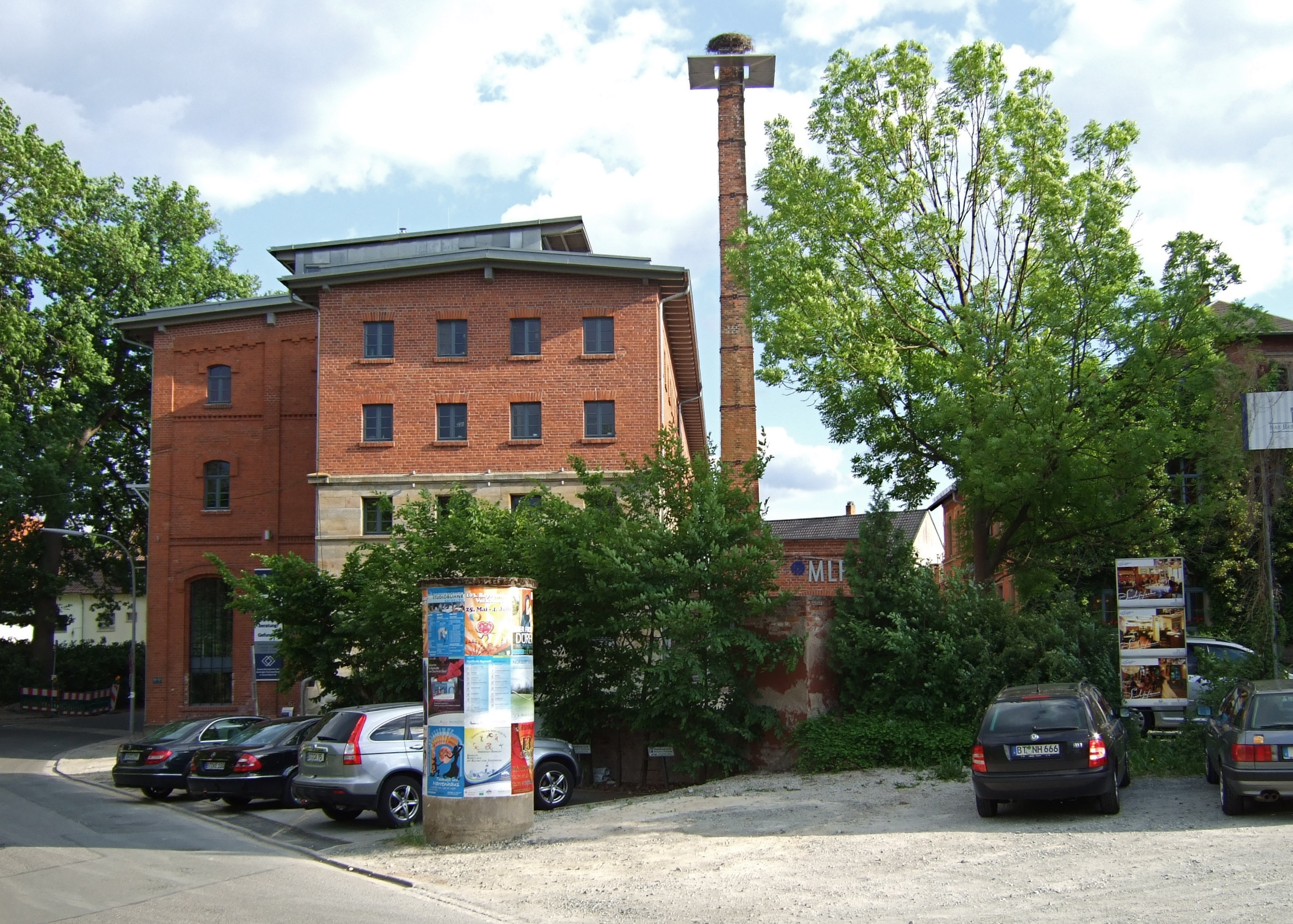 Sudhaus Oberkonnersreuth; Ehemalige Brauerei und Brauereigasthof; Denkmal Nr. D-4-62-000-430